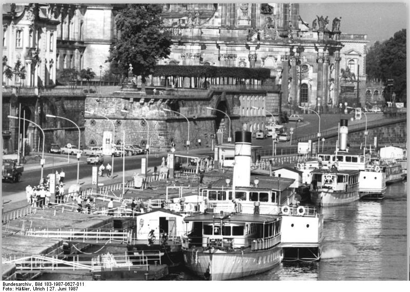 Dresden, "Weiße Flotte", Ausflugsschiffe ADN-ZB Häßler 27.6.1987 Dresden: Sommerwetter-Das lang erwartete schöne Sommerwetter lockte an diesem Wochenende viele Dresdner und ihre Gäste zu einem Ausflug. Gut besetzt starteten die Schiffe der Weißen Flotte in die Sächsische Schweiz.